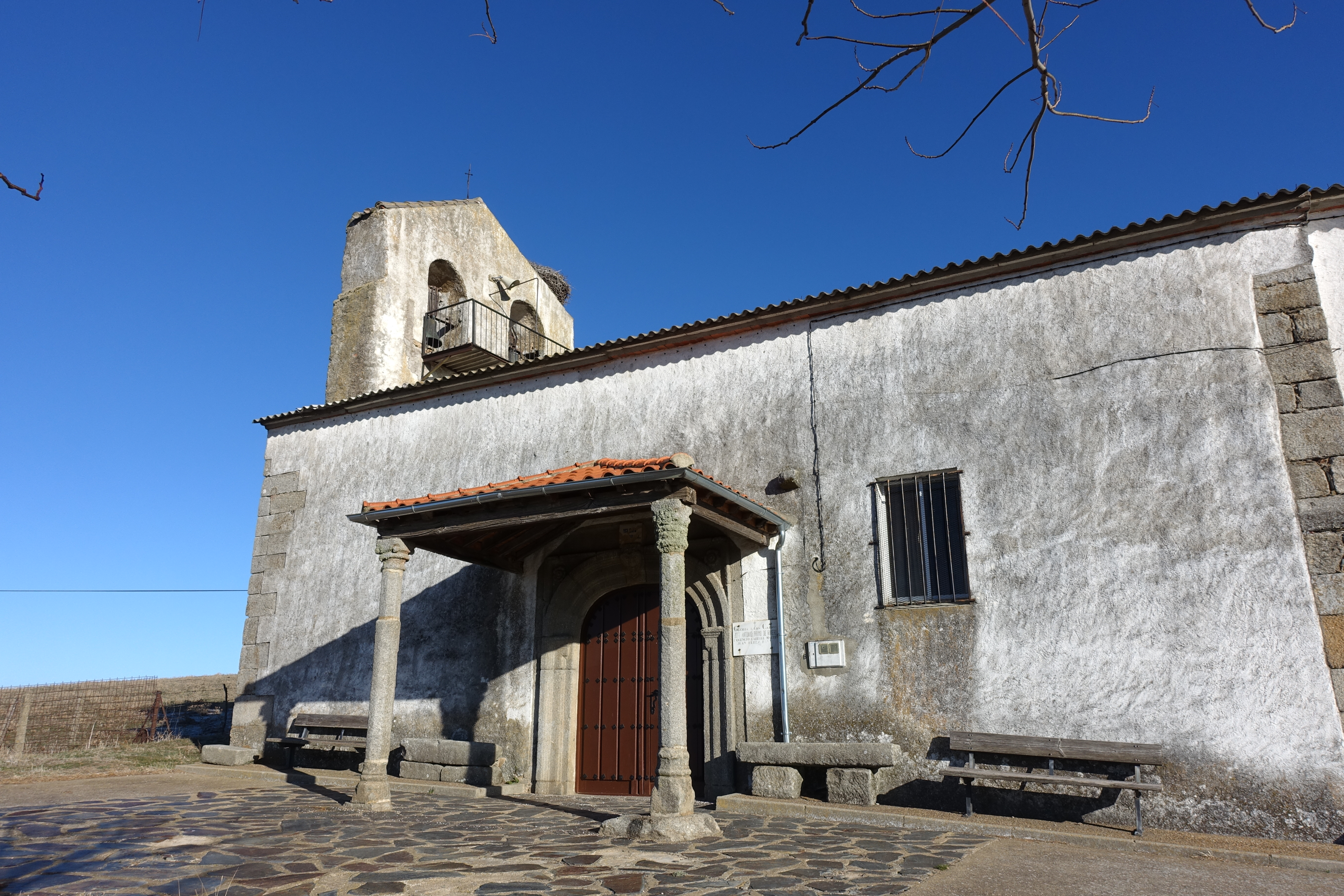 Iglesia de la Purificación, Narros de Matalayegua (Salamanca, España).